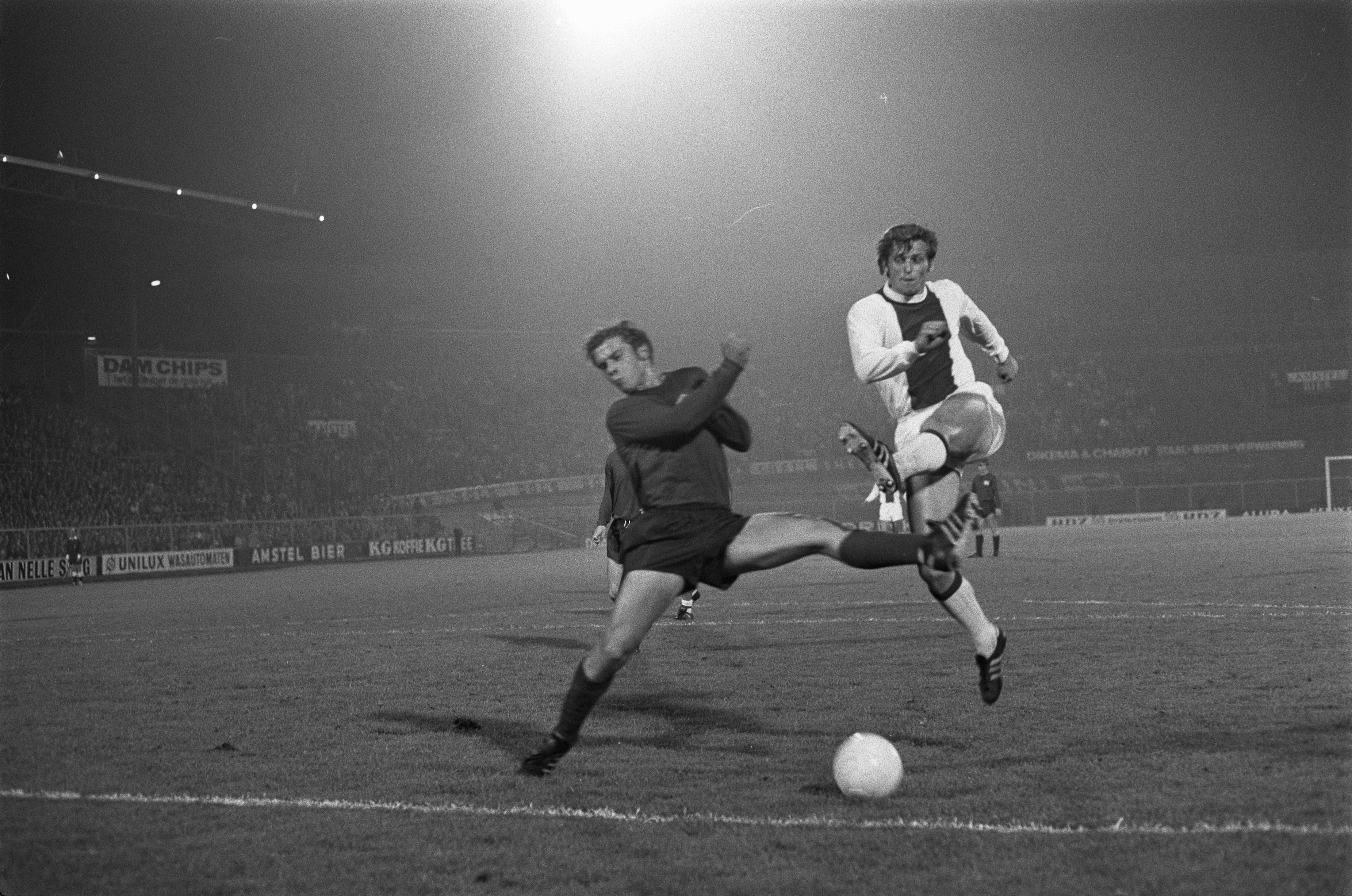 Collectie / Archief : Fotocollectie Anefo Reportage / Serie : [ onbekend ] Beschrijving : Ajax tegen Hannover 96 in het Olympisch Stadion Amsterdam in de Europa Cup voor Jaarbeurssteden (3-0) , Piet Keizer wordt geblokkeerd door Peter Loof Datum : 24 september 1969 Locatie : Amsterdam, Noord-Holland Trefwoorden : voetbal Persoonsnaam : Keizer, Piet, Loof, Peter Instellingsnaam : Europa Cup, Olympisch Stadion Fotograaf : Koch, Eric / Anefo Auteursrechthebbende : Nationaal Archief Materiaalsoort : Negatief (zwart/wit) Nummer archiefinventaris : bekijk toegang 2.24.01.05 Bestanddeelnummer : 922-8208